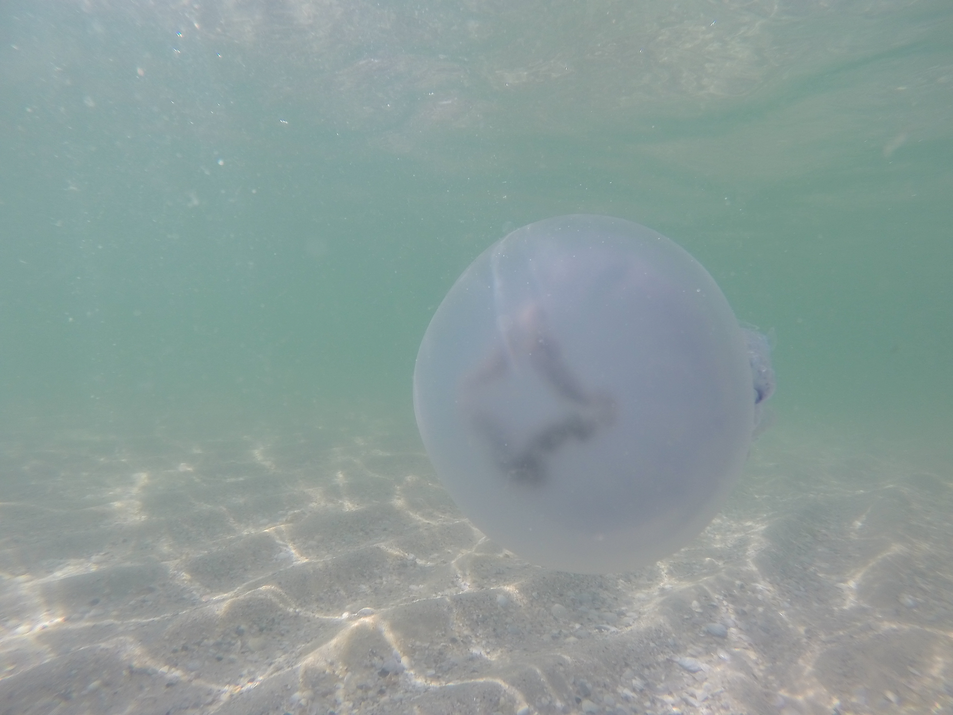 Знято під час експедиції на о. Джарилгач This photo/video of Dzharylhach was taken during Wikiexpedition to Dzharylhach supported by Wikimedia Ukraine. You can see all photographs in category Category:Wikiexpedition to Dzharylhach. English | українська | +/−